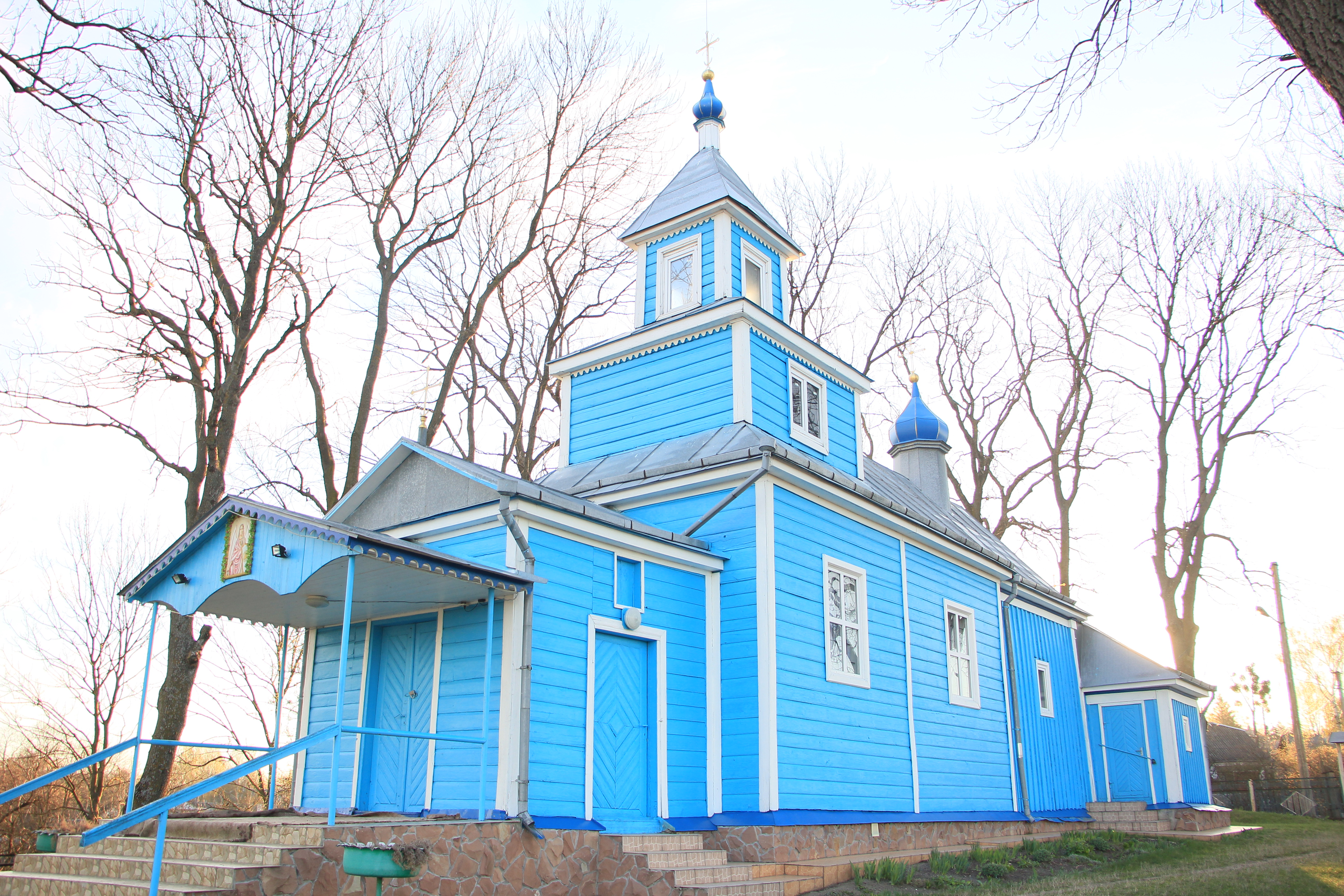 Дерев'яна церква в селі Великі Дедеркали Шумьского району Тернопільської області